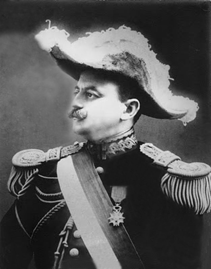 Oscar R. Benavides en 1933